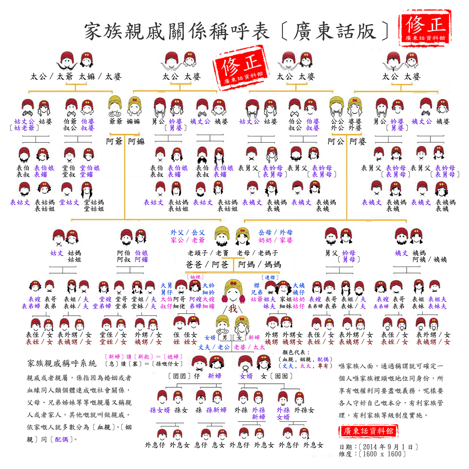 最後修正圖．2014年9月1曰